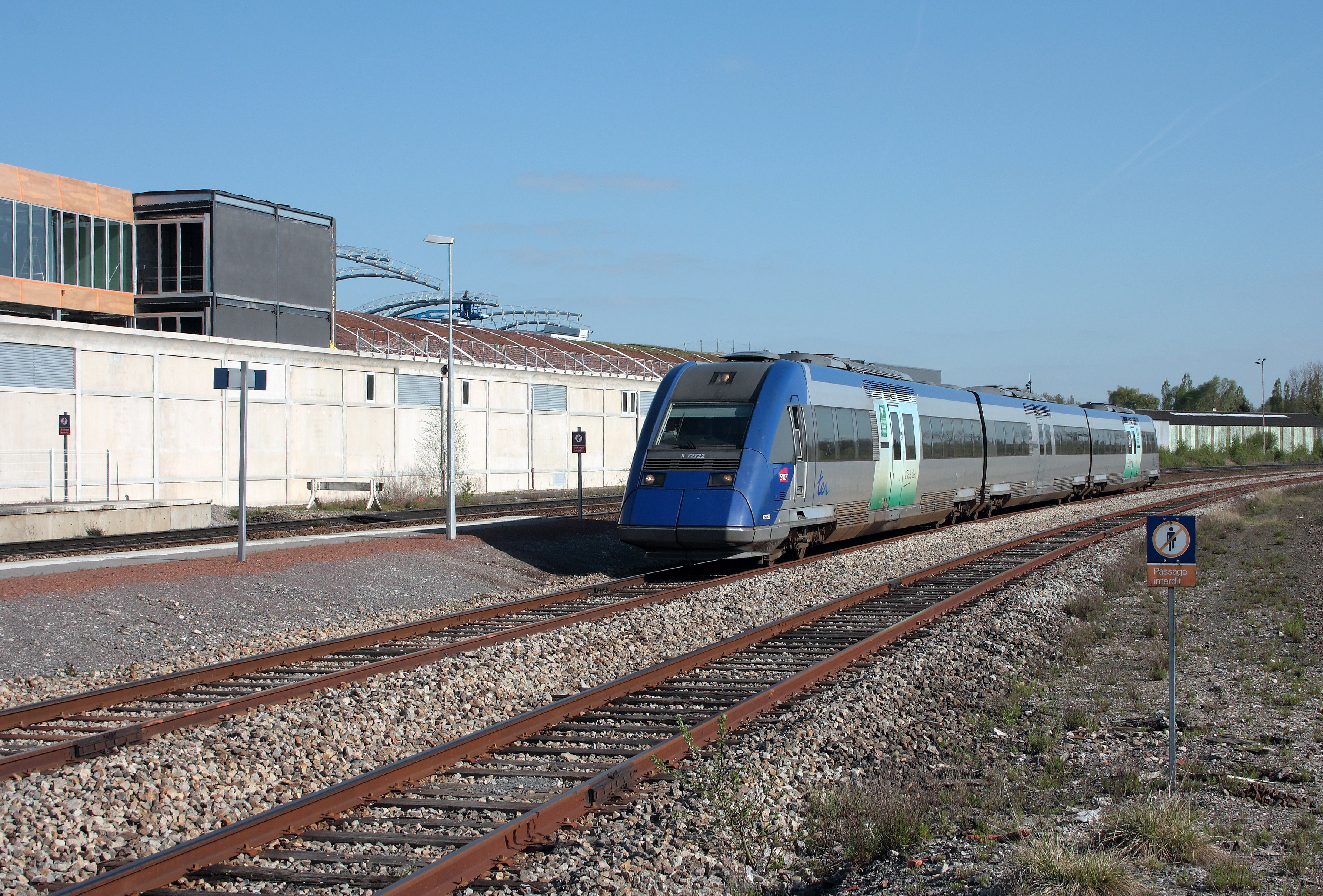 Rame X 72500 (élément 721/722), arrivant en gare d'Abbeville.